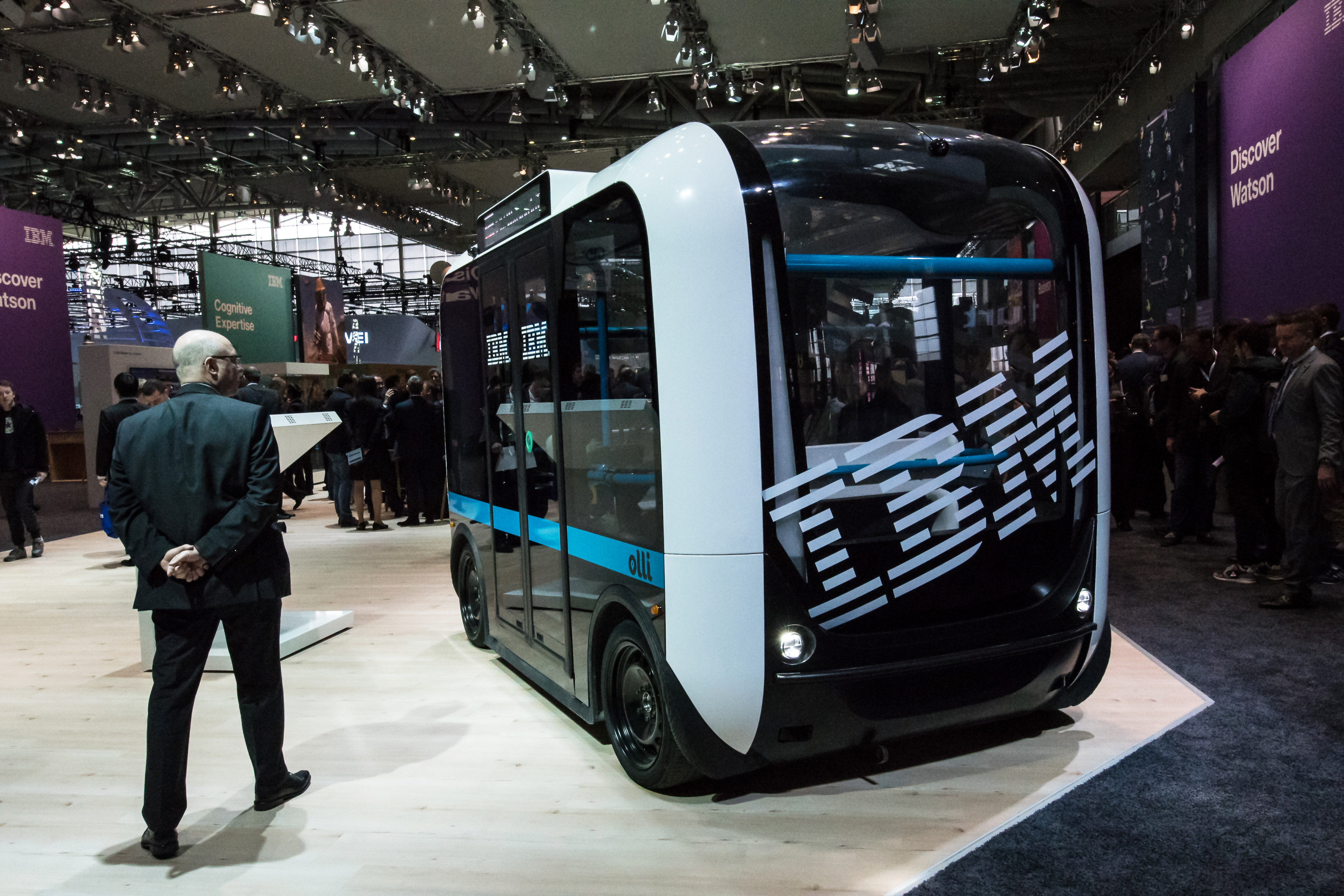 IBM Local Motors 'Olli bei der CeBIt 2017